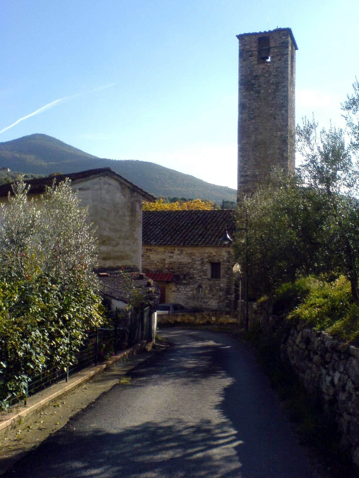 Pieve di San Severo a Legri